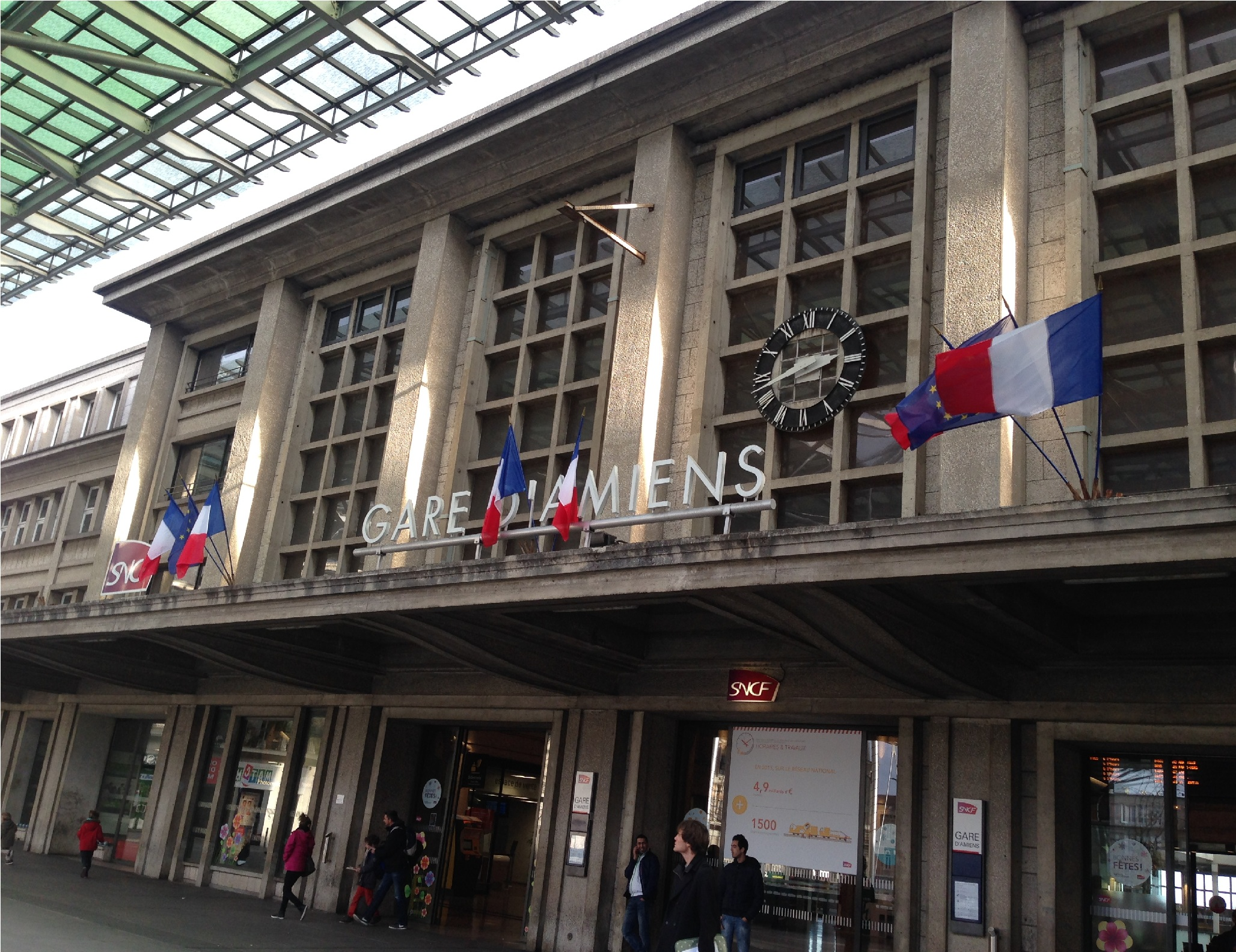 亚眠站（Gare d'Amiens）